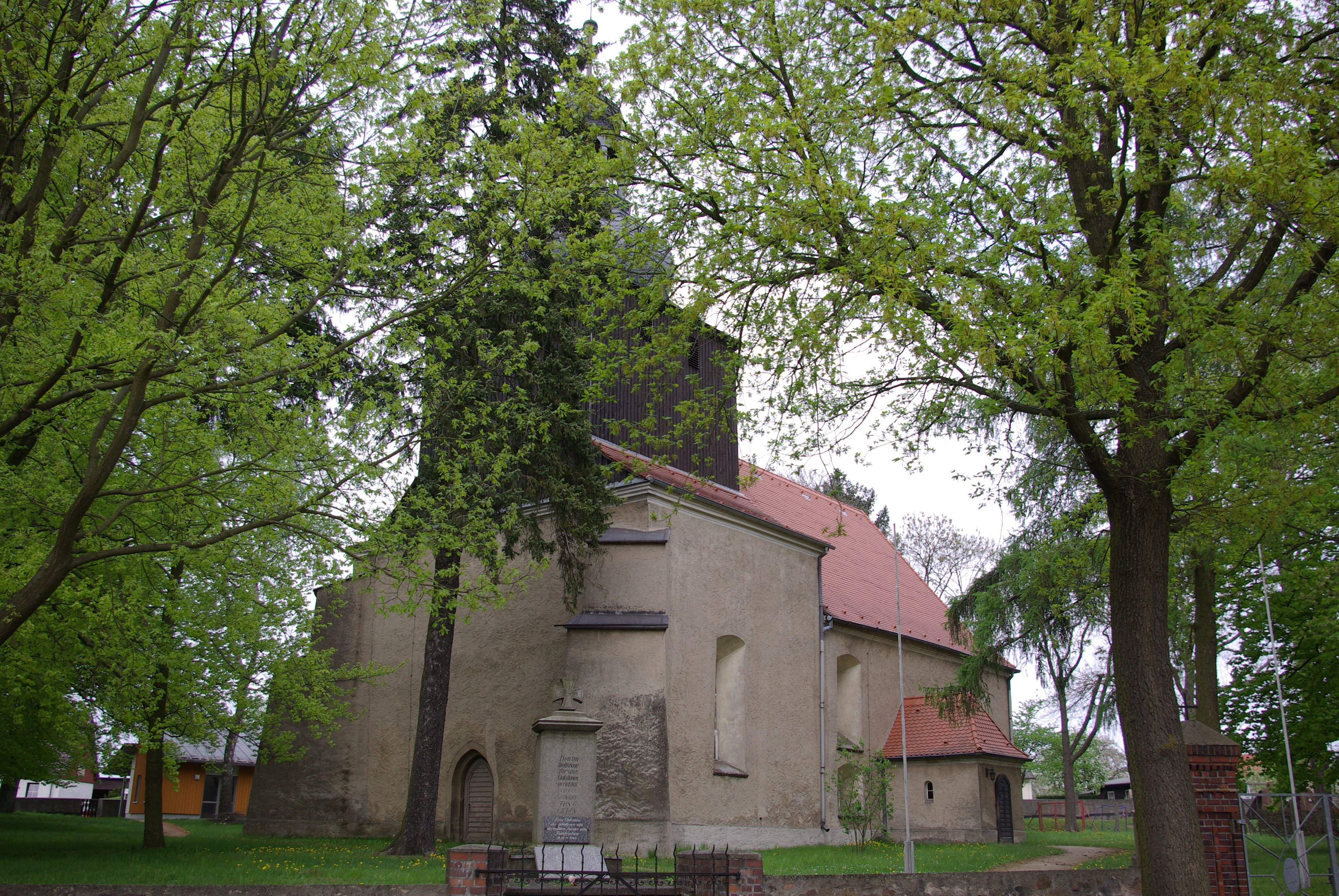 Schlaubetal Ortsteil Fünfeichen in Brandenburg. Die Kirche stammt aus dem 15. Jahrhundert und steht unter Denkmalschutz.